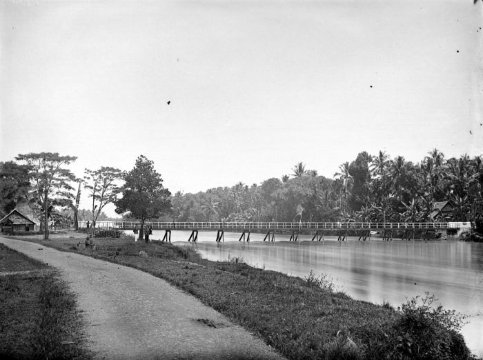 Negatief. Riviergezicht met brug, Pankajene, Sulawesi